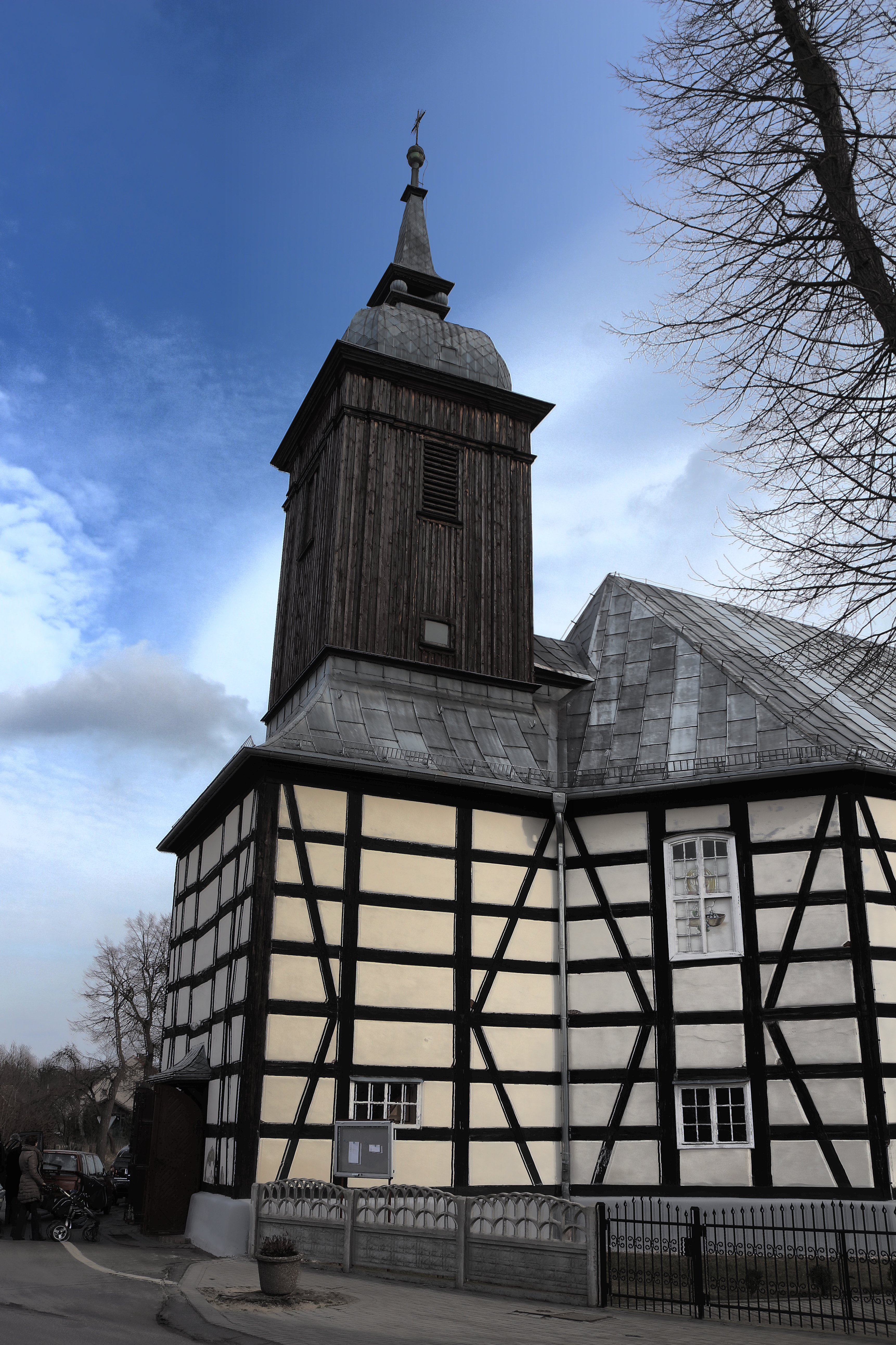 Bojadła, kościół ewangelicki, ob. rzym.-kat. par. p.w. św. Teresy, 1757